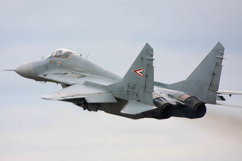 Mig 29 - RIAT 2008